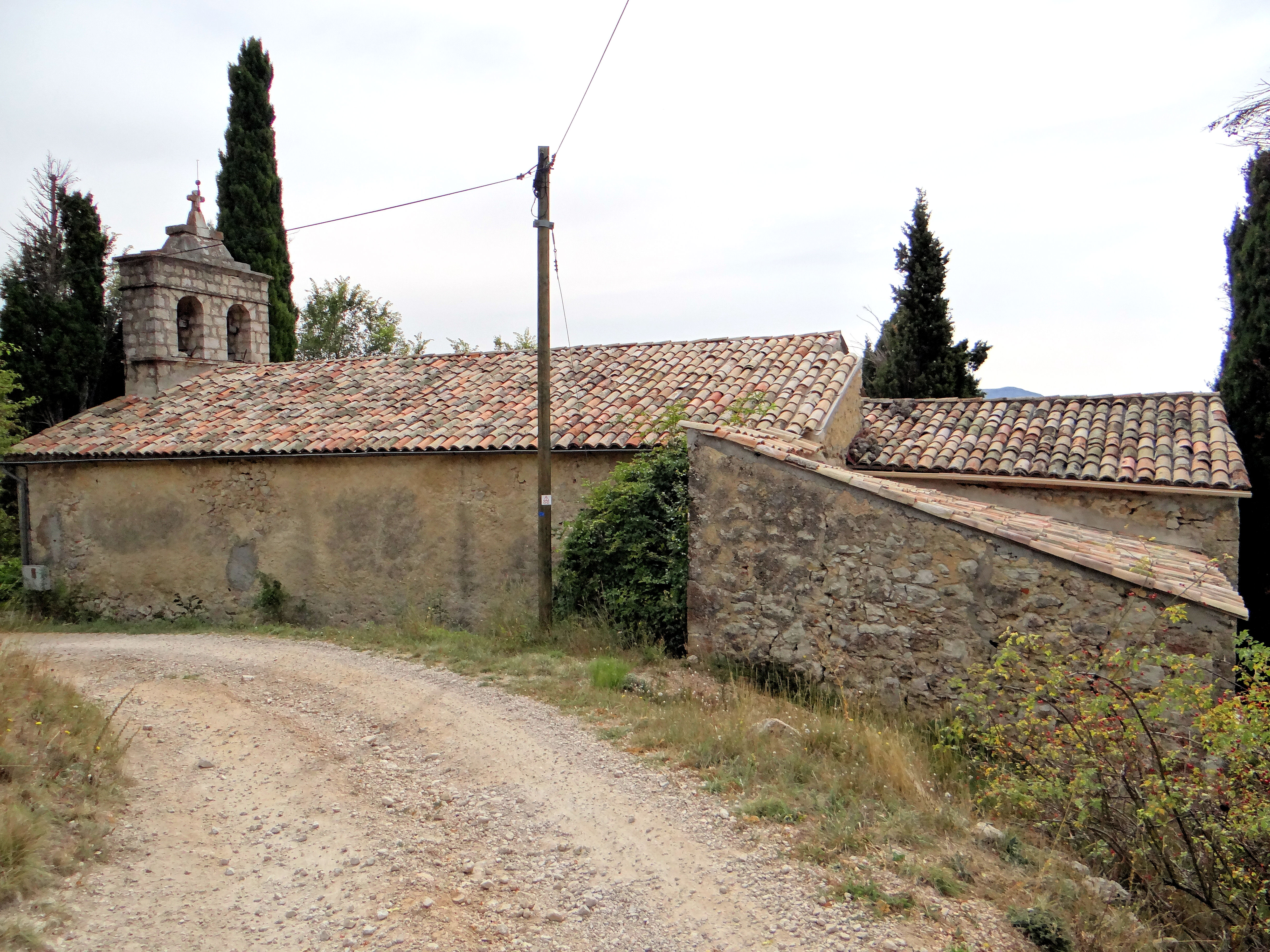 Castellane - Église paroissiale Saint-Pons d'Éoulx - Vue d'ensemble